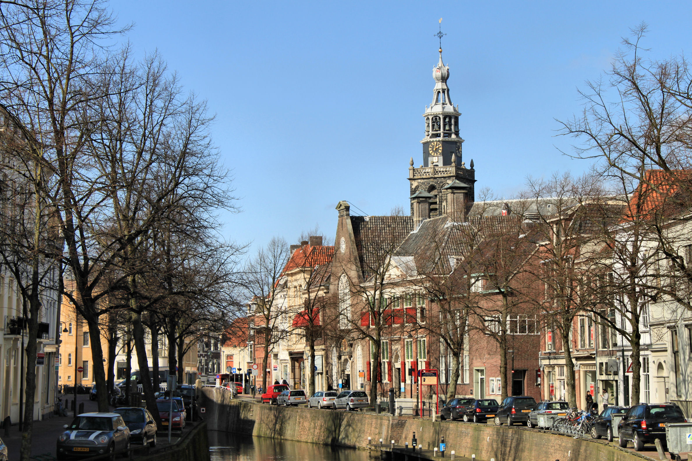 Uitzicht over de Oost- en Westhaven in Gouda